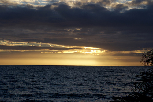 Nasce o dia em Beberibe, Ceará, Brasil.